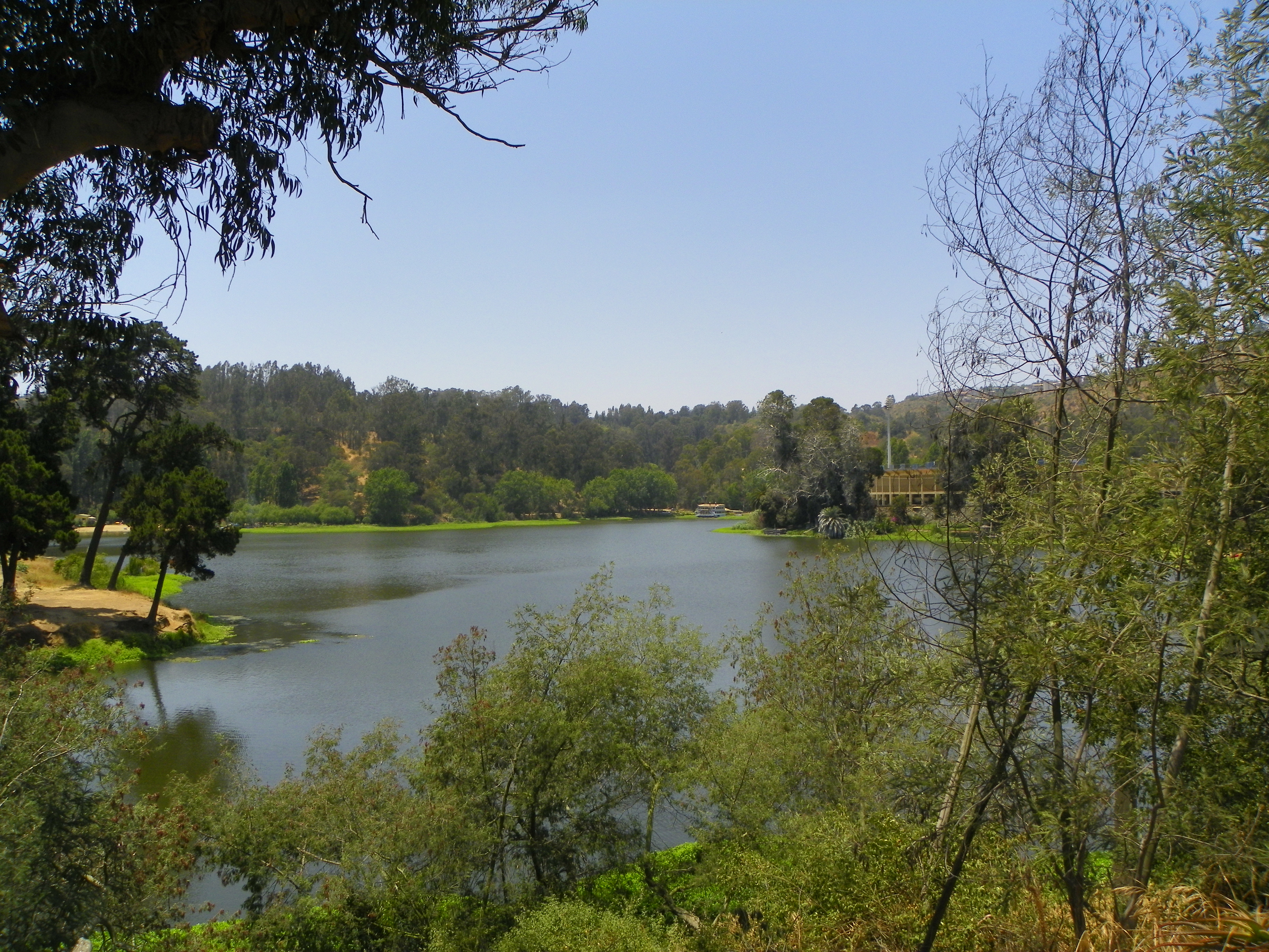 Sausalito, Viña Del Mar, Chile